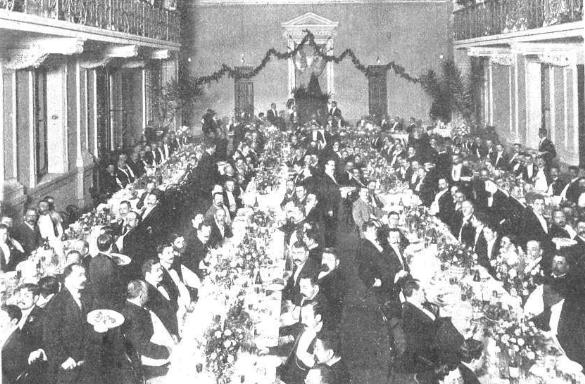 Banquete por la Piedra Fundamental del Puerto de Santa Fe. Con presencia del Gobernador Freyre y los señores Gálvez, Marciá y Gollán.